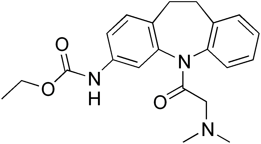 chemical structure of tiracizine